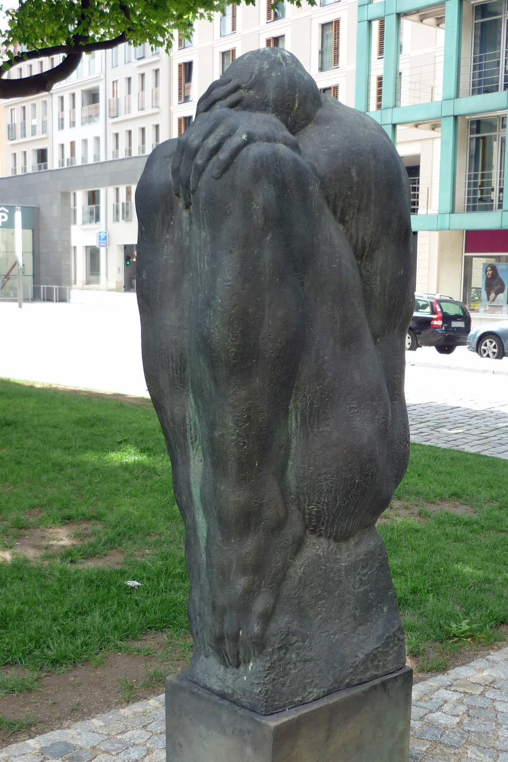 Großer Trauernder (1983) auf dem Georg-Treu-Platz in Dresden